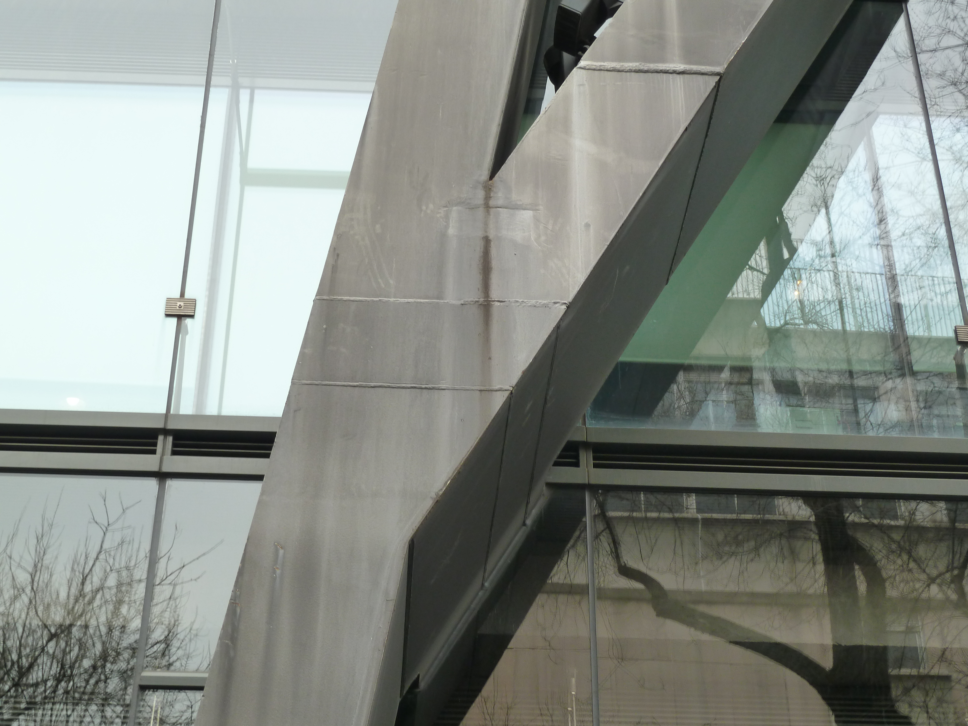 Detalle de unión del soporte de acero conformado con chapas soldadas